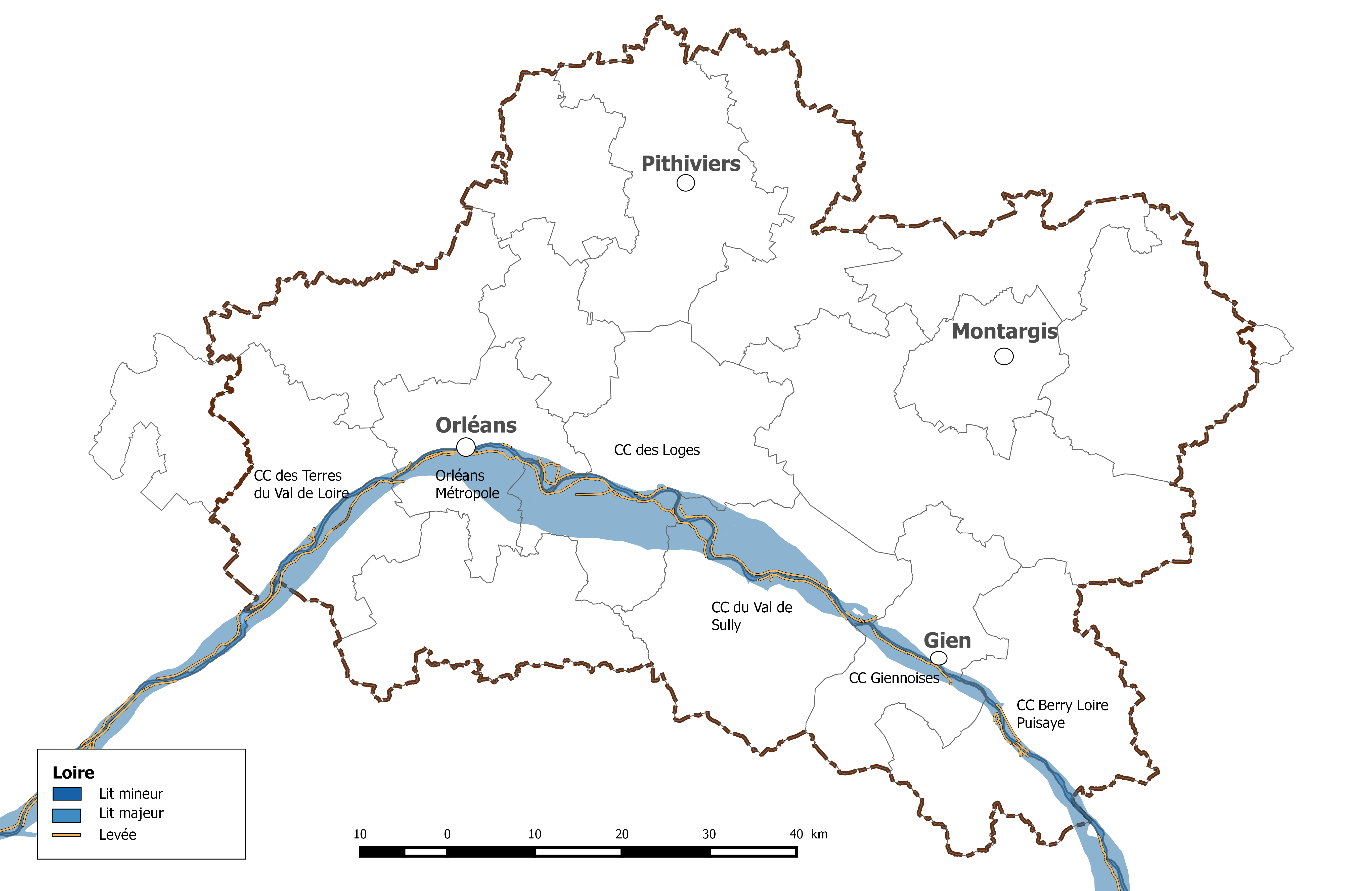 Système d'endiguement de la Loire dans le Loiret